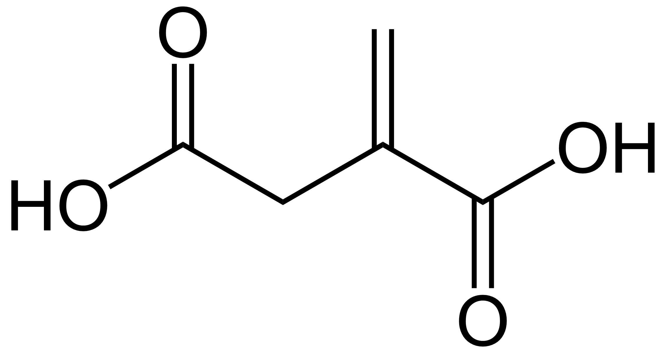 Itaconic acid